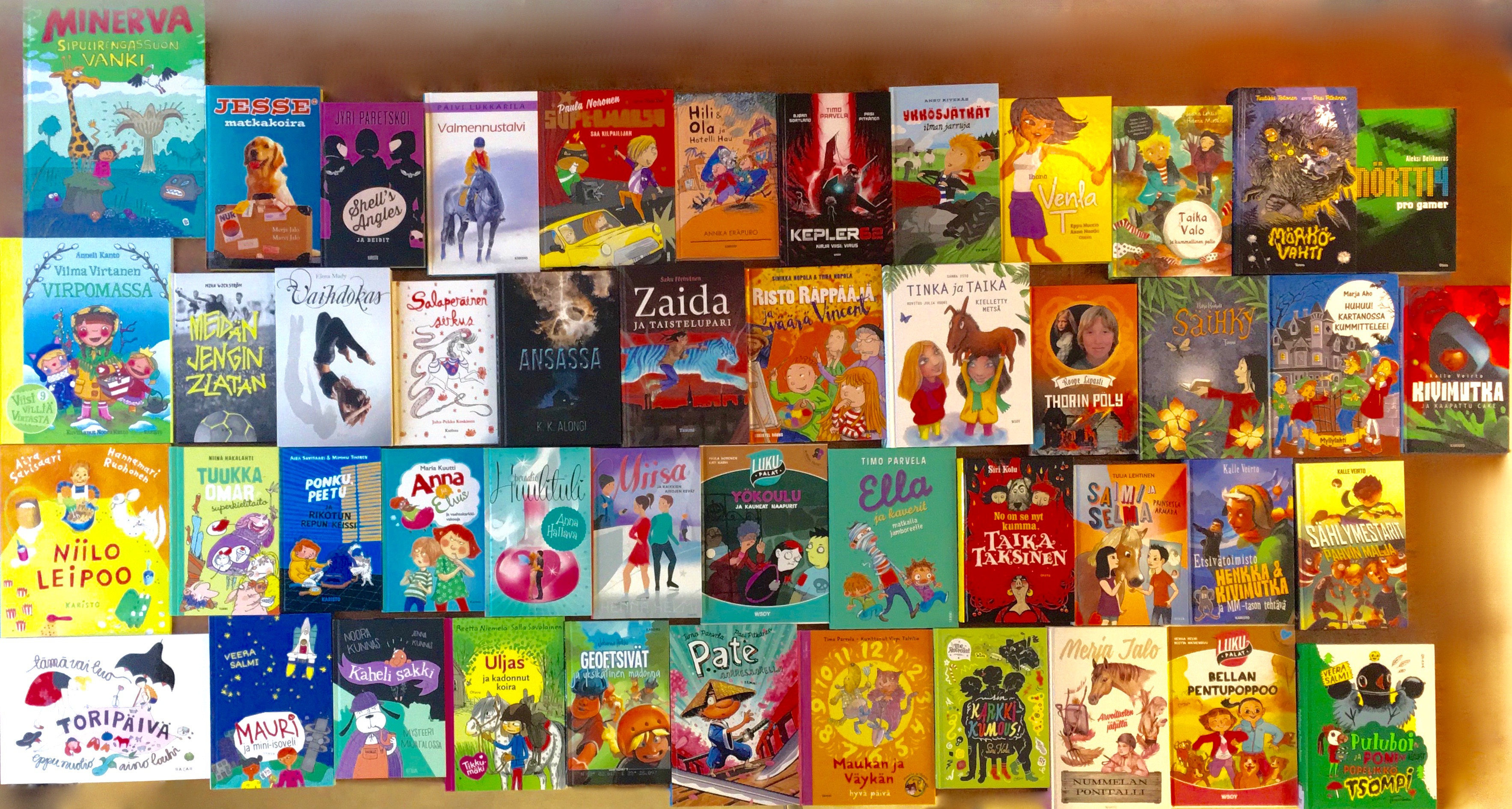 Anni Polva -kilpailun kirjaehdokkaita 2017.